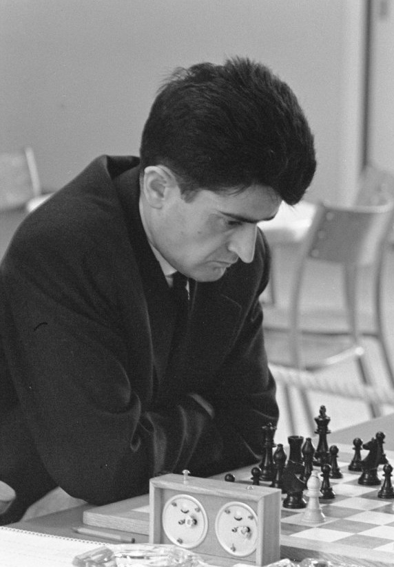 Aleksandar Matanović. Internationaal toernooi in Zevenaar